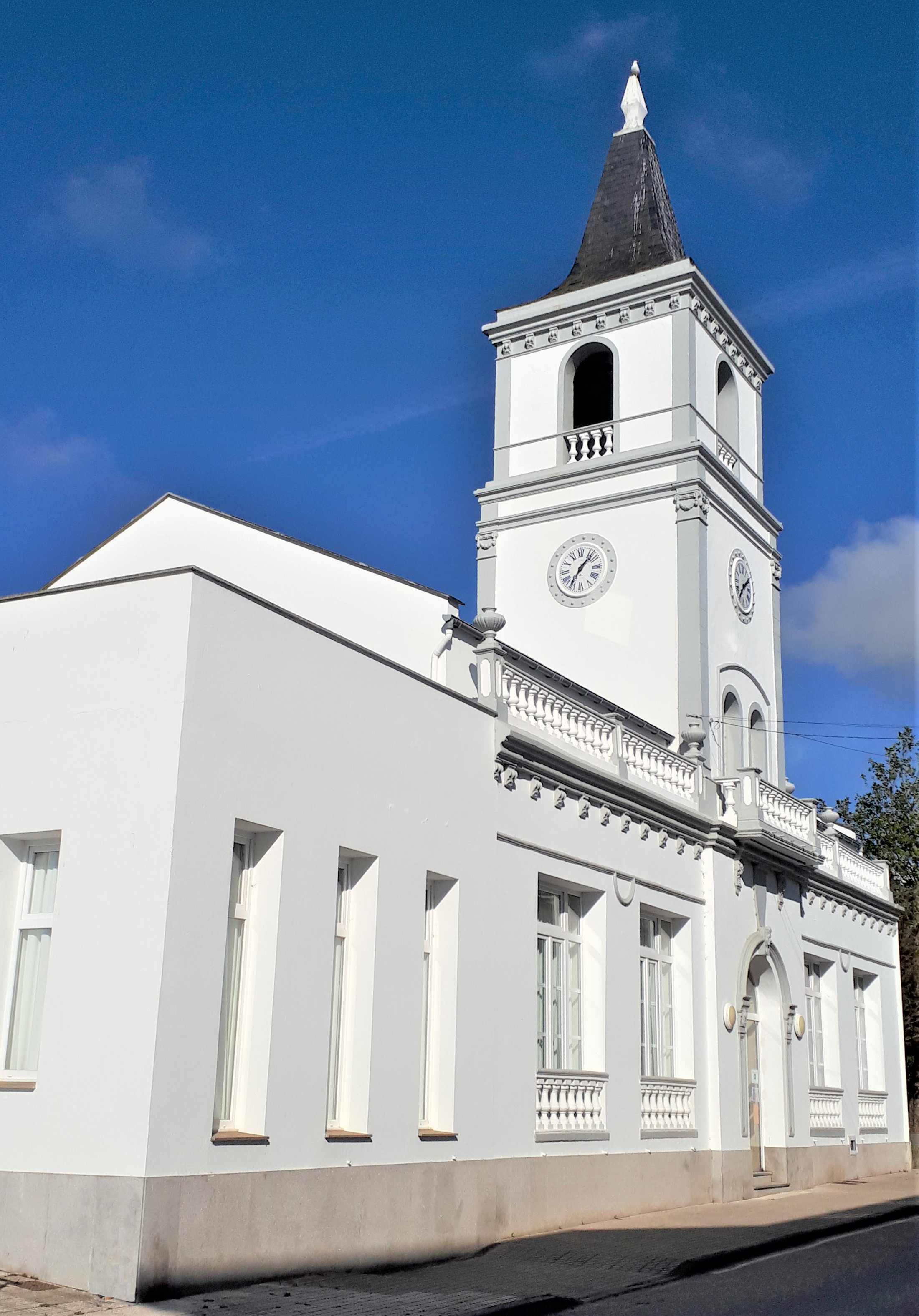 Torre del Reloj, casa de cultura de Figueras (Asturias - España). Inaugurada el 3 de julio de 1927 como donación testamentaria de Domingo Gayol y Martínez Magadán. El Ayuntamiento de Figueras le añadió dos locales como escuelas públicas, para niños y niñas, y otro para biblioteca, que funcionaron hasta 1976. Desde 2006, tras una reforma integral, es la Casa de Cultura municipal.